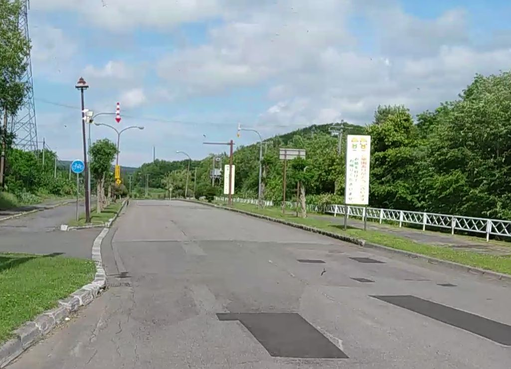 北海道道843号宿野辺保養基地線・起点（グリーンピア大沼側から）